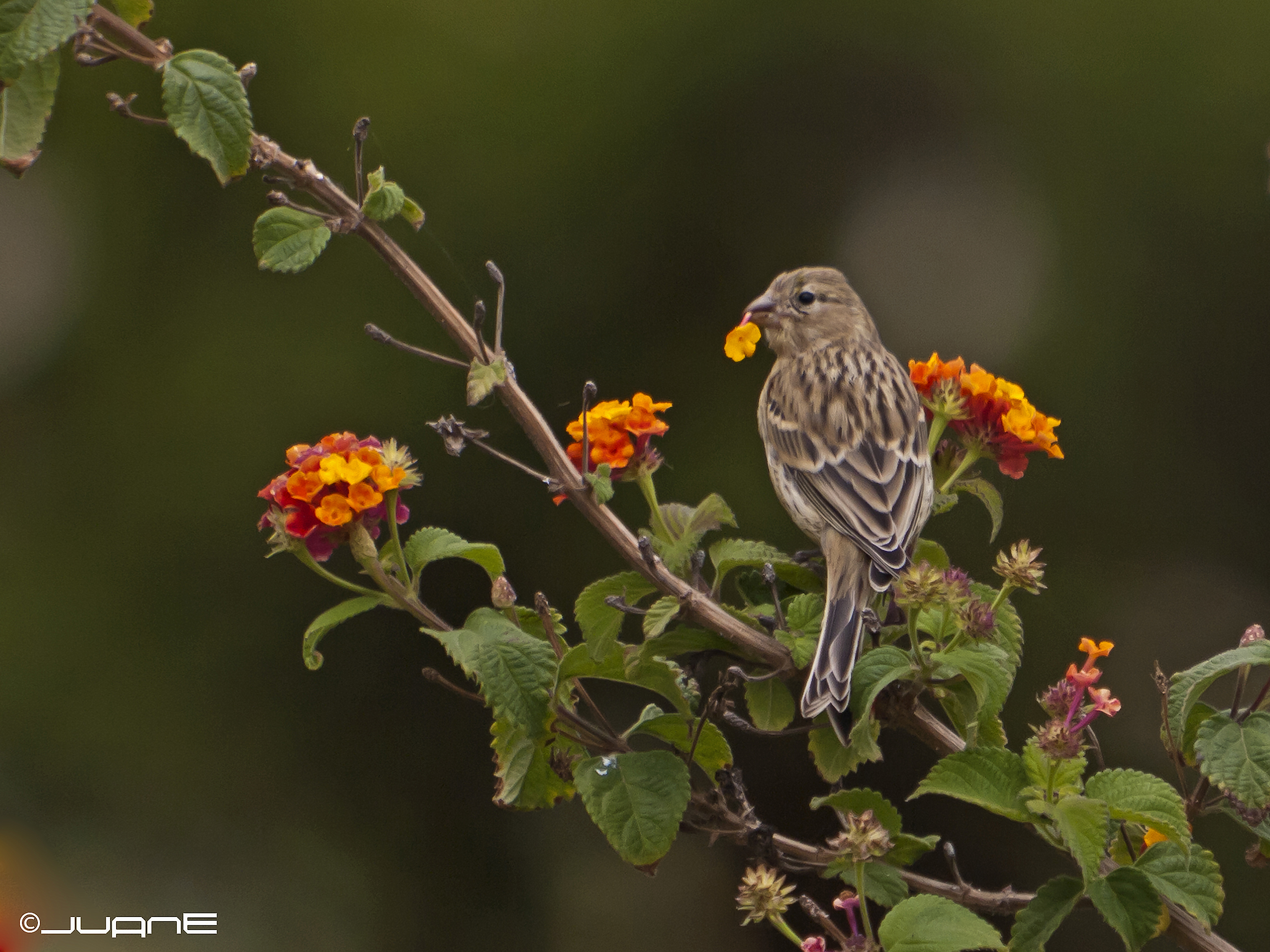 Canario silvestre, Serinus canarius(♀)